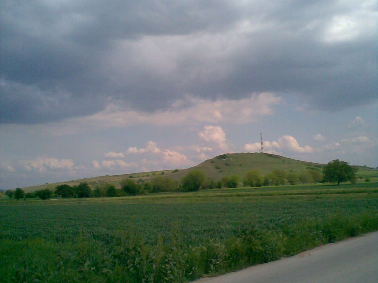 Поглед кон Зајчев Рид од селото Бардовци